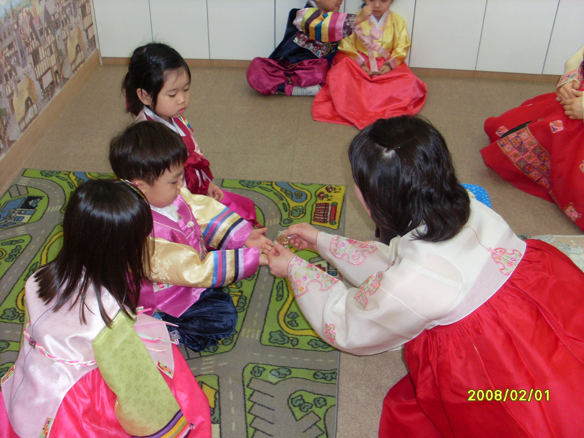 中文（香港）: 韓國新年歲拜